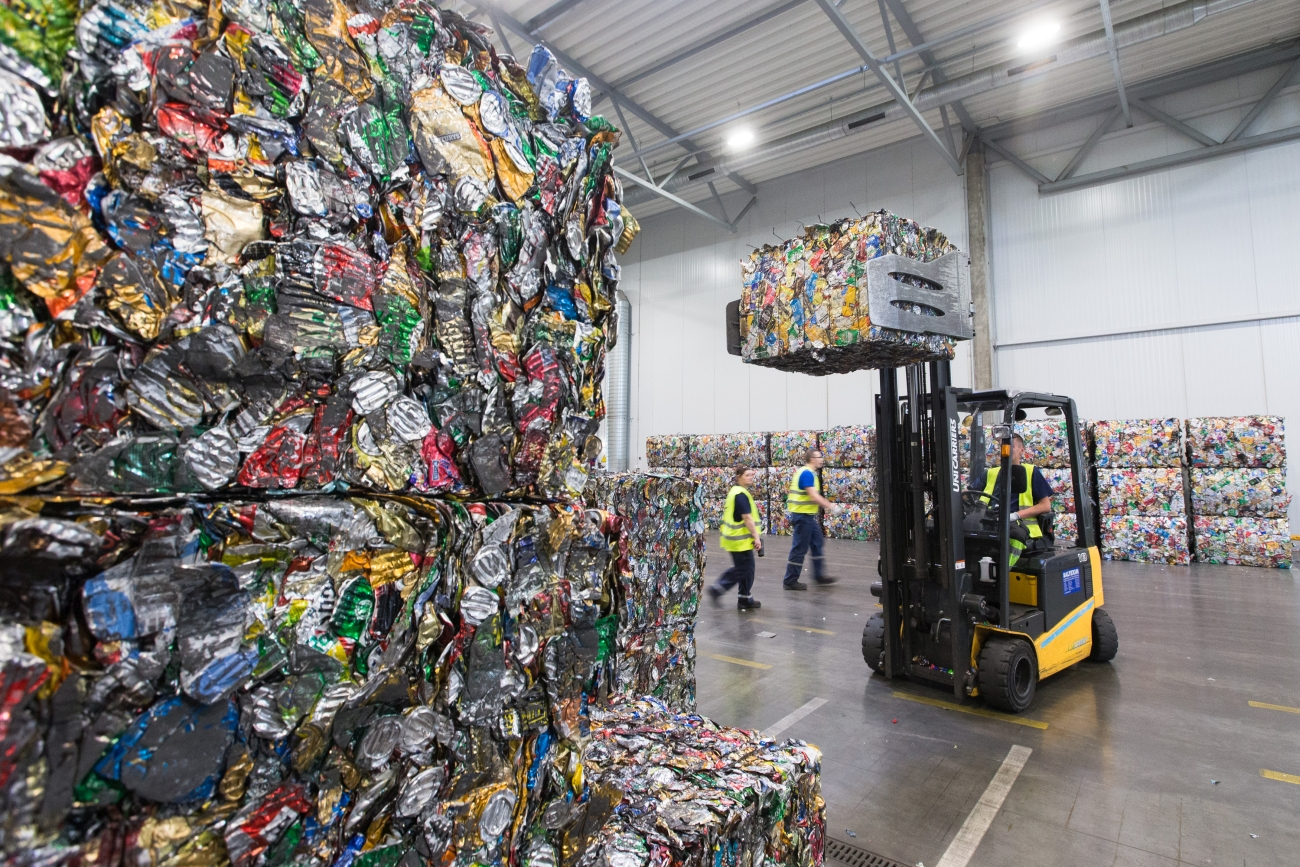 Supresuotų gėrimų skardinių blokai USAD skaičiavimo centre